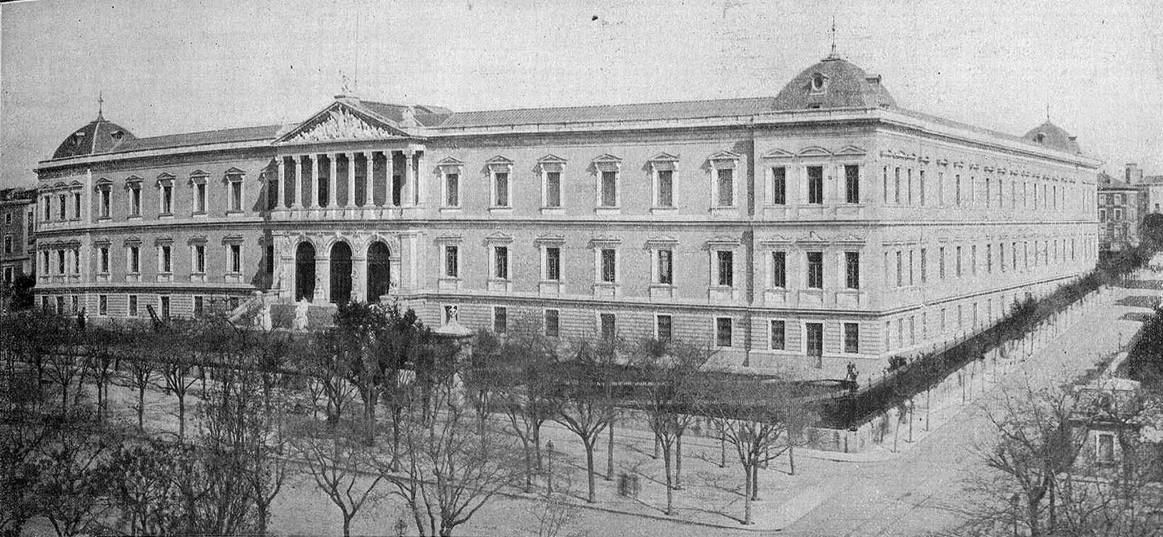 Biblioteca Nacional, en la revista española La Ilustración Artística.